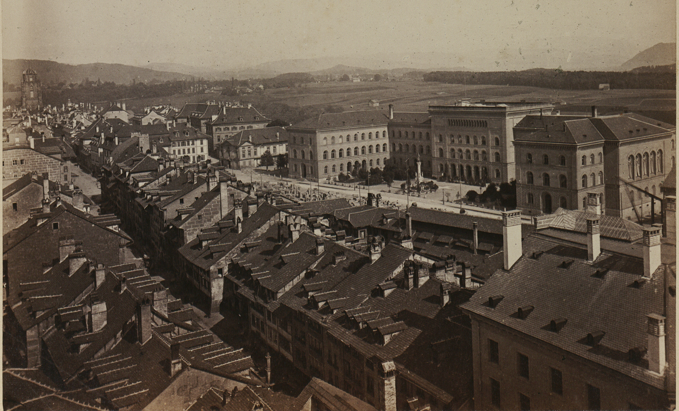 Foto von Bern mit dem Bundes-Rathaus und im Hintergrund dem Kirchenfeld. Aufgenommen vom später abgebrochenen Christoffelturm. Albuminpapier